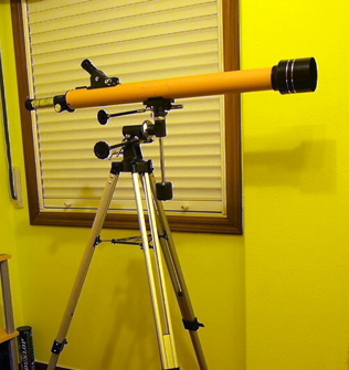 Telescopio